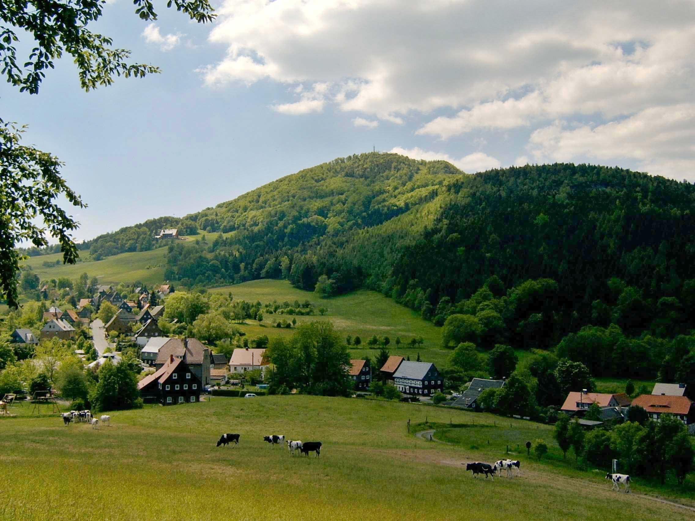 Die Lausche im Zittauer Gebirge, Blick über Waltersdorf zur Lausche.